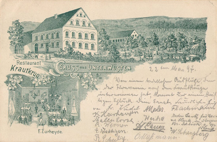 Deutschland - Nordrhein-Westfalen - Kreis Lippe - Bad Salzuflen, Ortsteil Wüsten: asthof Krautkrug